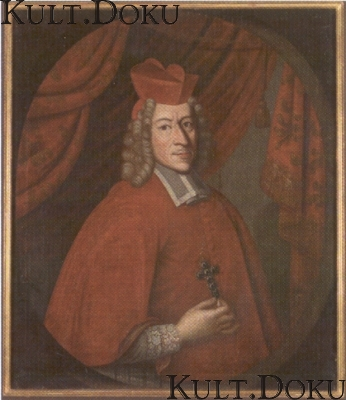 Kardinal Johann Philipp Graf von Lamberg (c.1651-1712)